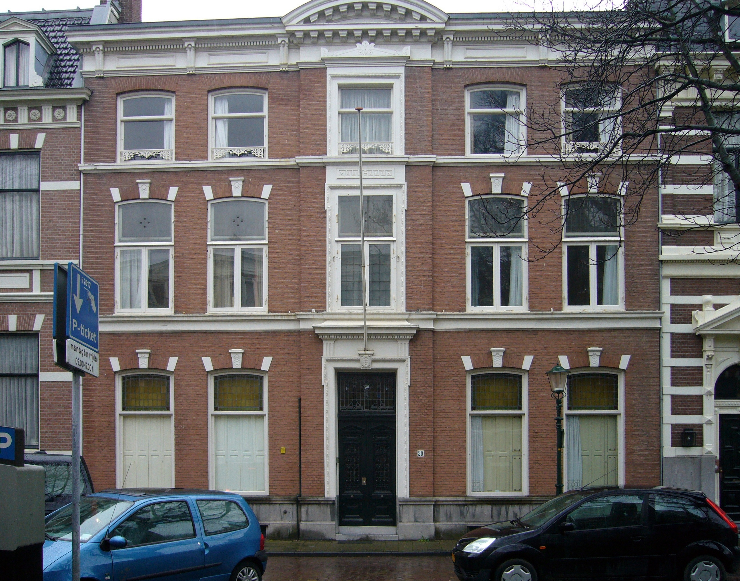 Louis Couperus, zijn ouderlijk huis aan de Surinamestraat 20, Den Haag